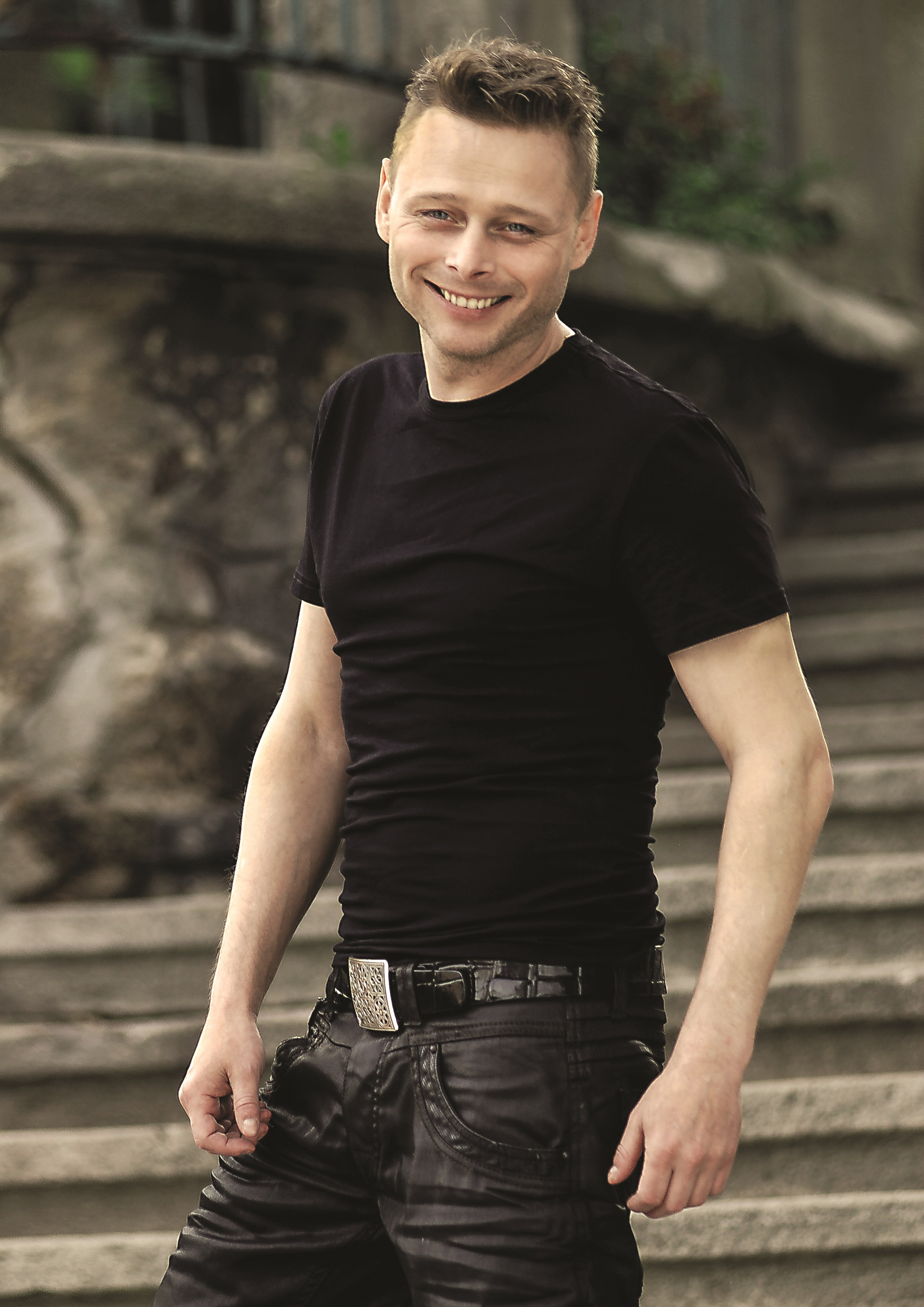 Jarek Šimek